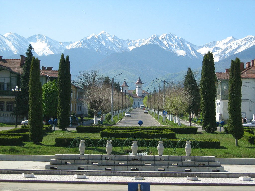 Image de Victoria (Roumanie)